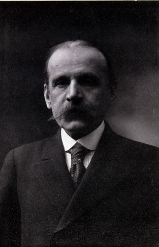 Alfonso Rubbiani